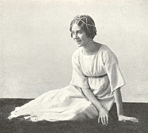 Fanny Falkner som Svanevit i August Strindbergs pjäs med samma namn på Intima Teatern.